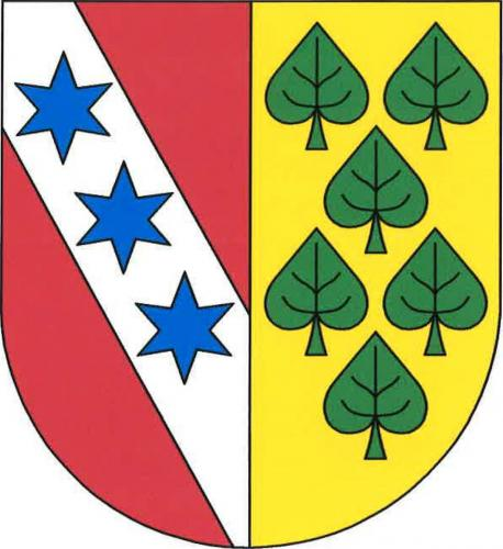 znak, Prosenická Lhota, okres Příbram